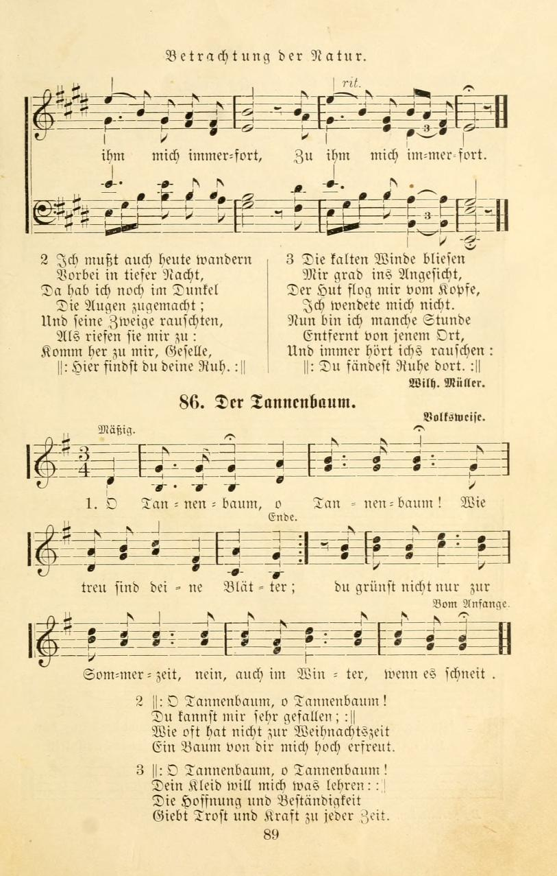 Liedtext und Noten von Der Tannenbaum (O Tannenbaum). Auf der oberen Blatthälfte befinden sich die zweite und dritte Strophe von Am Brunnen vor dem Thore